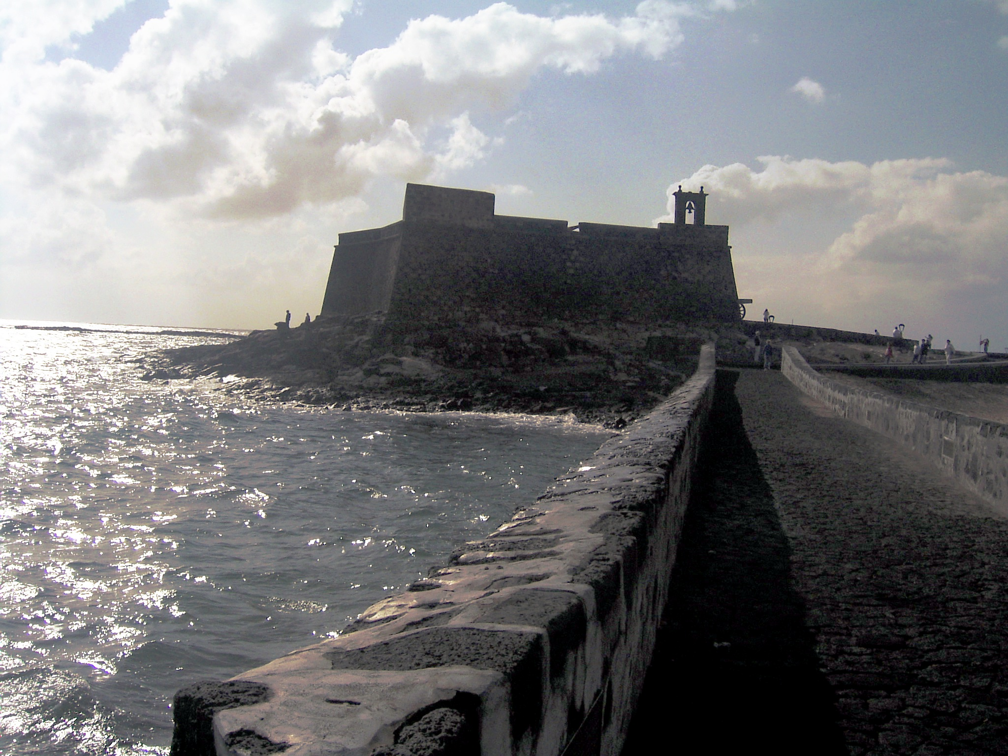 Castillo de San Gabriel, Arrecife, Lanzarote Privatbild selbst aufgenommen CX827GX 18:33, 8. Jan 2006 (CET)